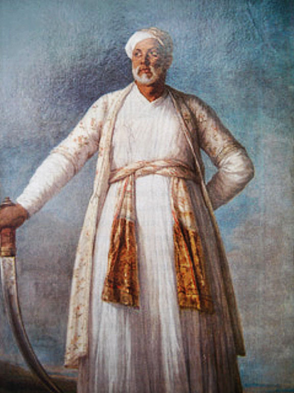 Mohammed Dervich Khan Ier.,[1] 1787, portrait en pied au sabre, collection privée. ↑